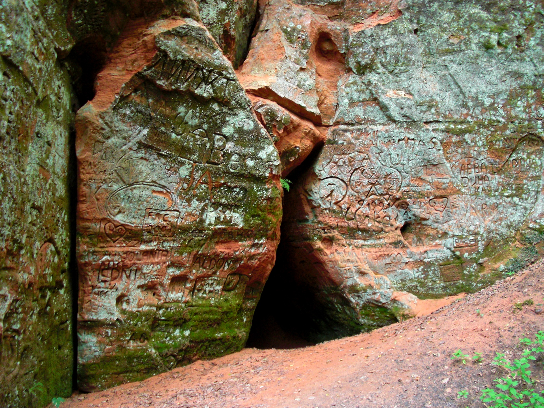 Krauklu aiza